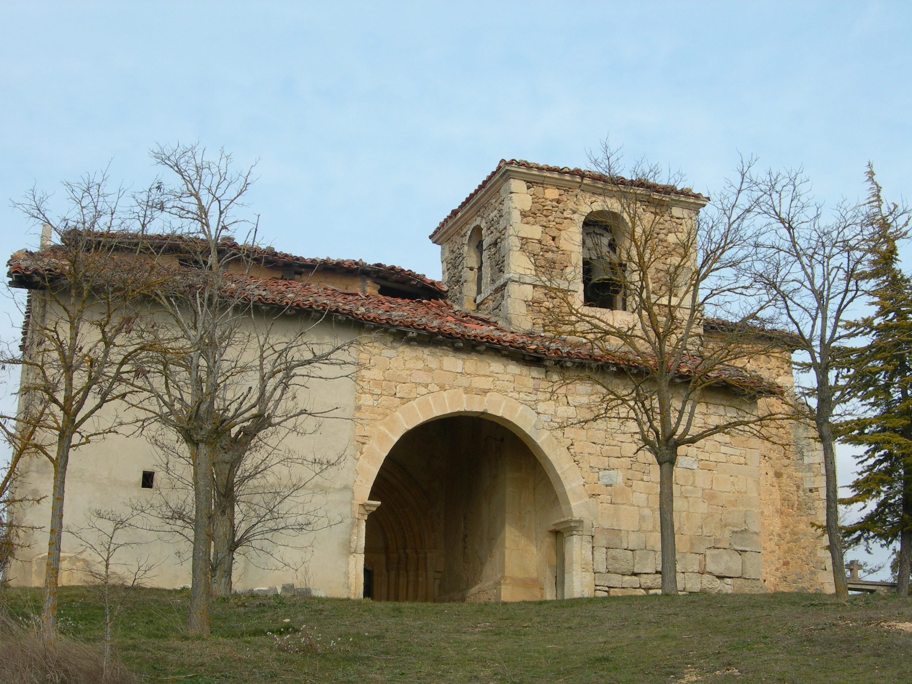 Imagen de la Iglesa parroquial de Saraso, Treviño, España